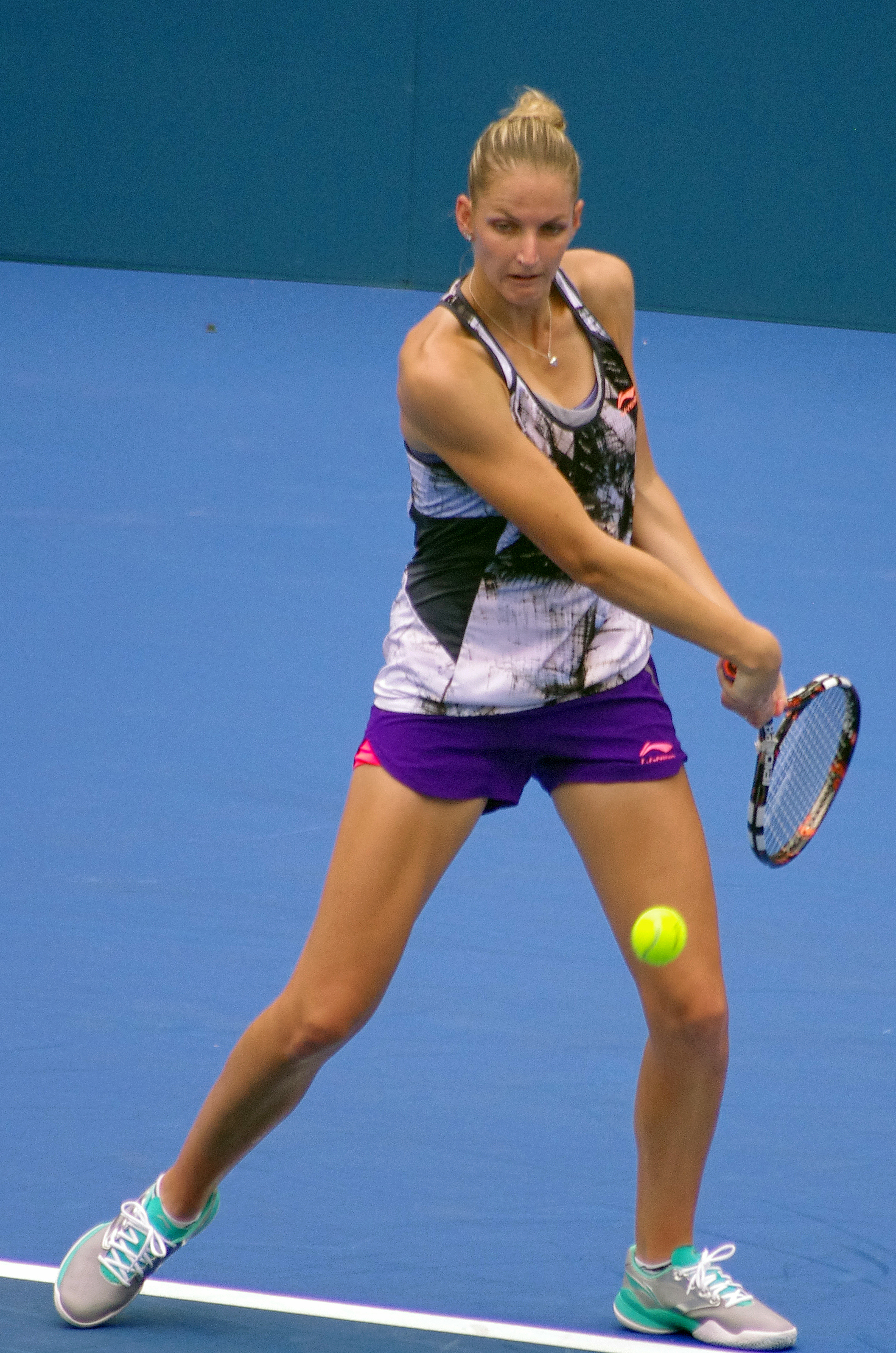 Karolína Plíšková at the 2015 Apia International Sydney